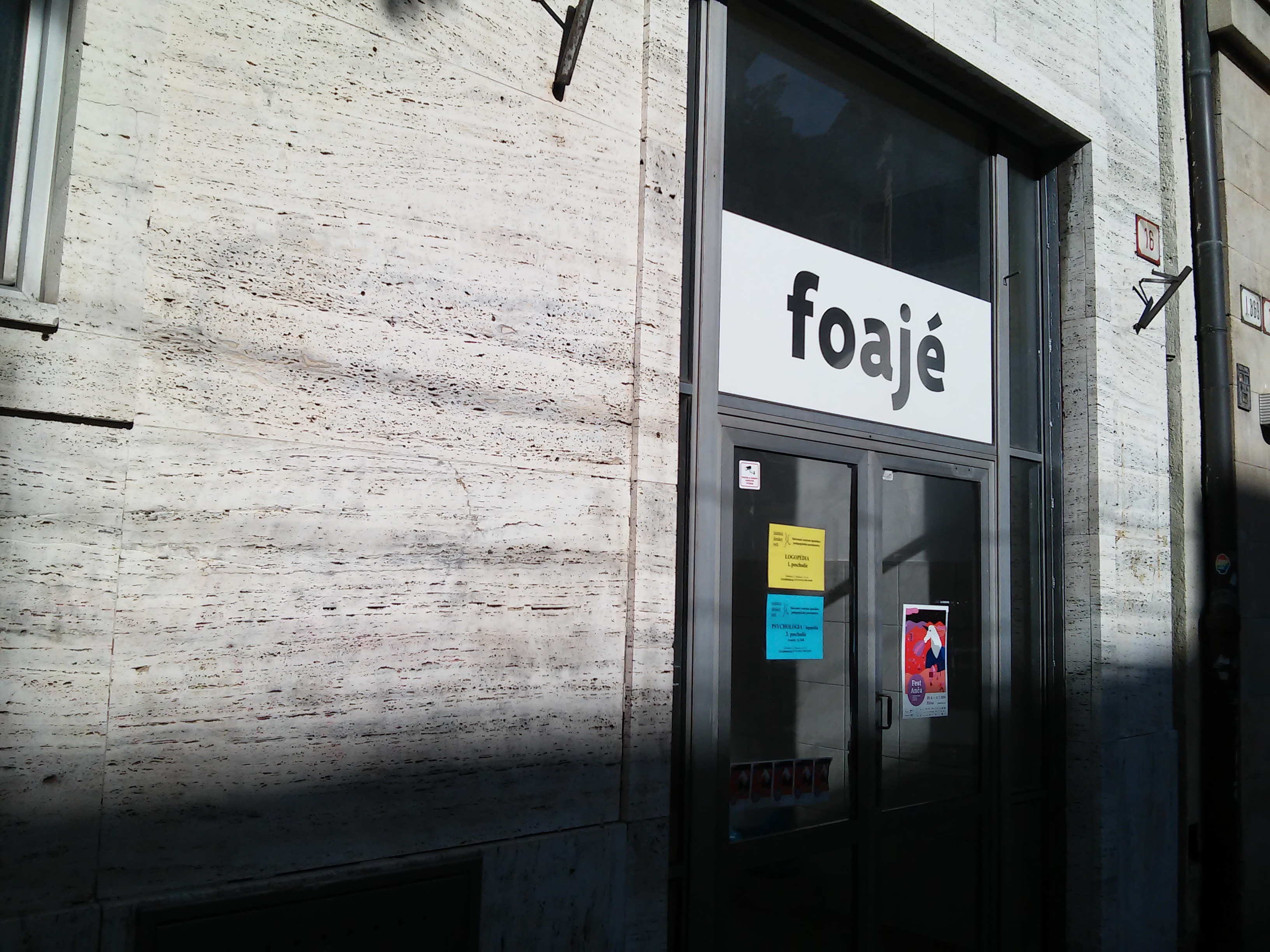 Foajé, Štefánikova 16, Bratislava